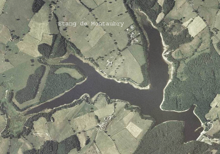 Auteur : THIERY Benoit Origine : Collection personnelle Description : Vue aérienne de l'étang de Montaubry.